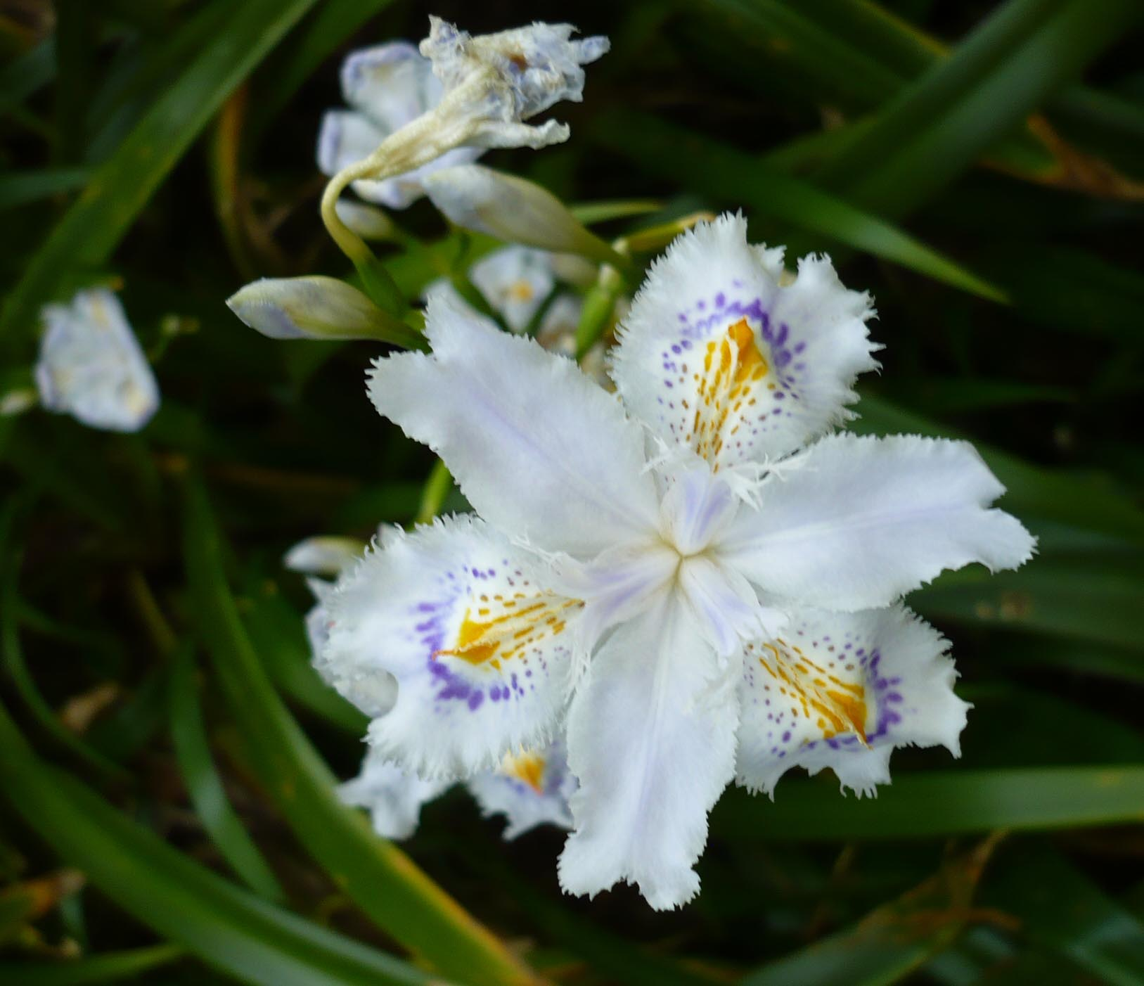 飯盛山城に咲く花